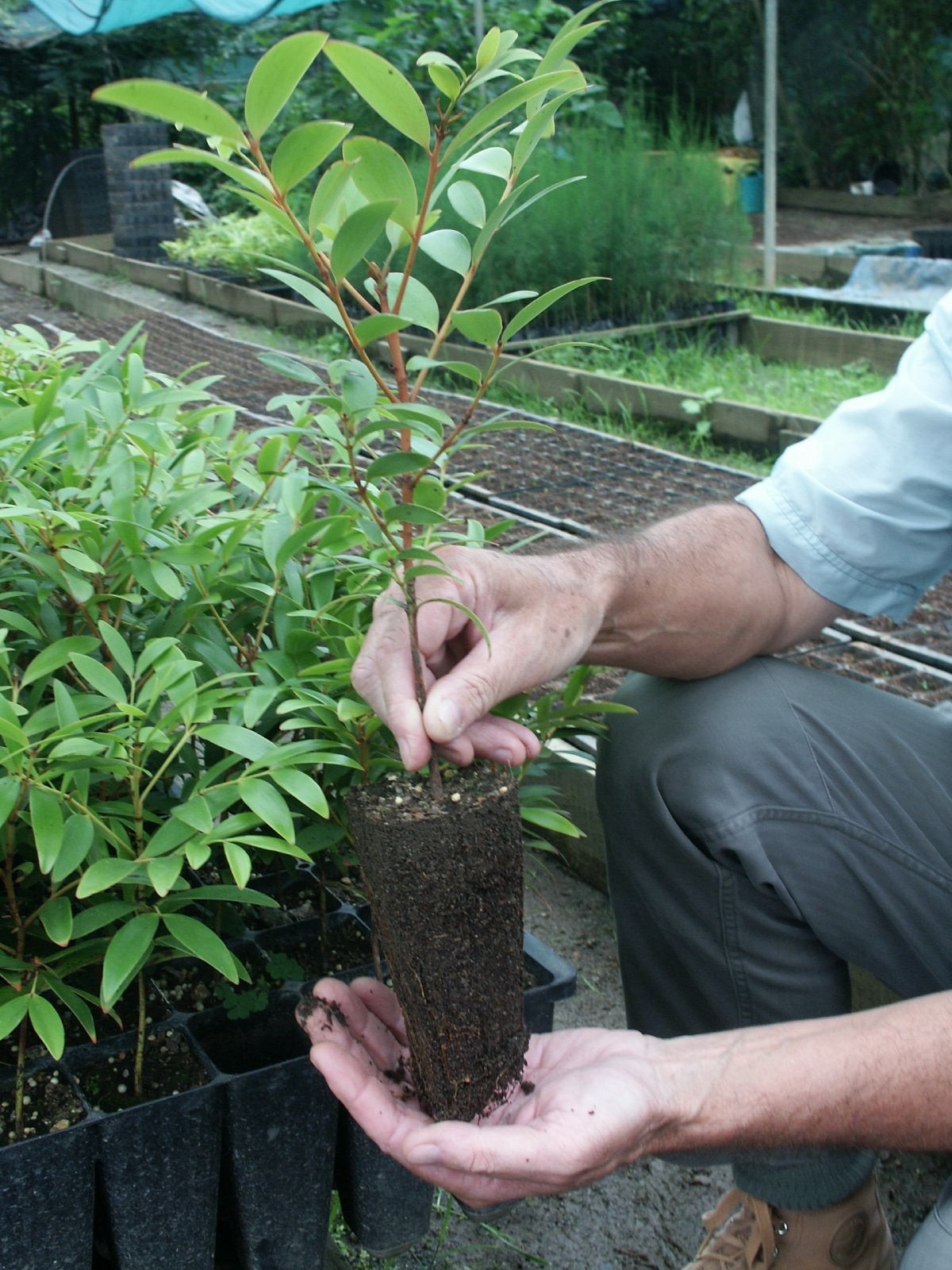 Plant d'Agathis lanceolata - Pépinière M'Boueni à La Foa - Nouvelle-Calédonie.